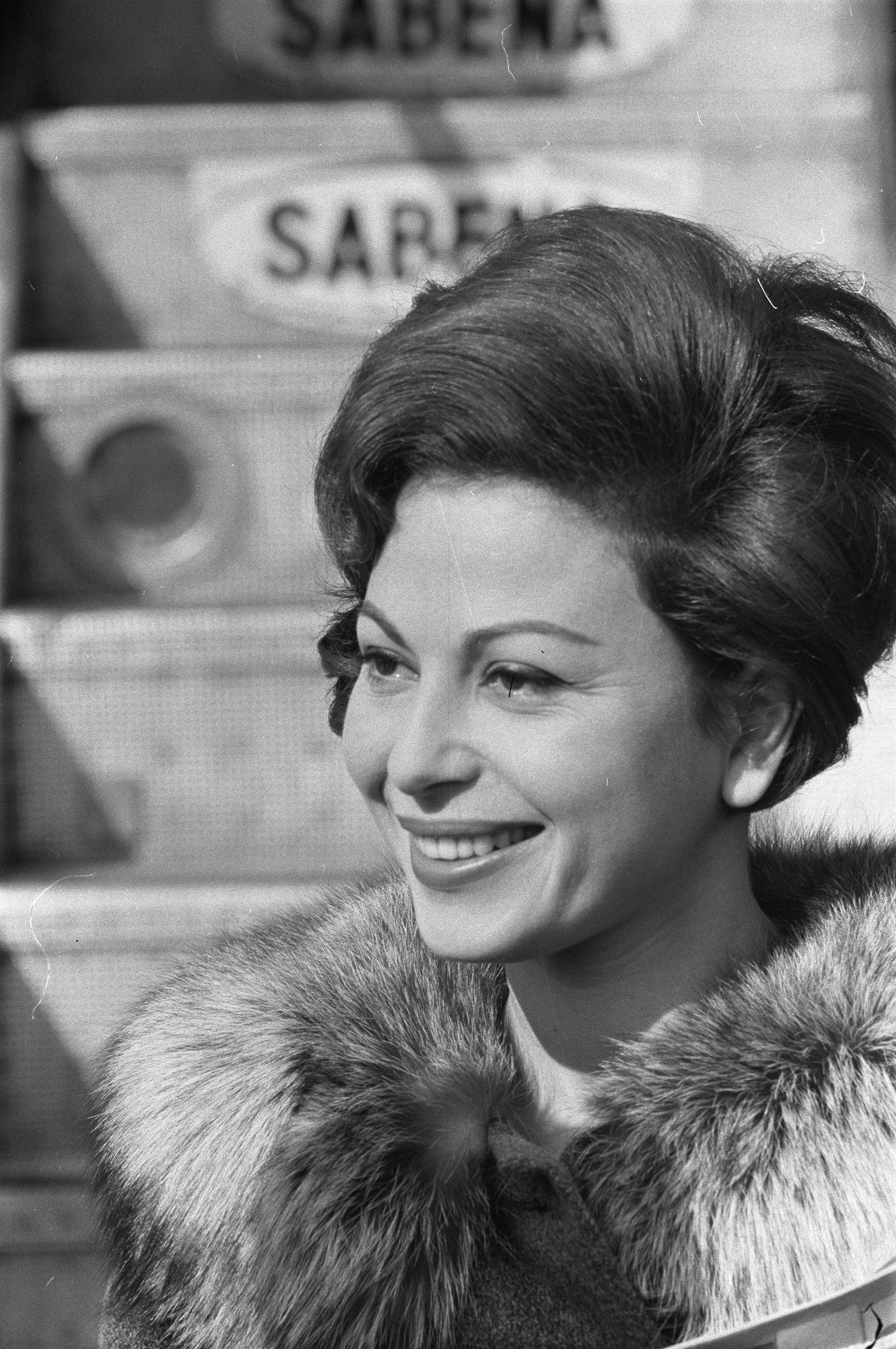 Collectie / Archief : Fotocollectie Anefo Reportage / Serie : Aankomst op Schiphol van de hoofdrolvertolkster in de film "Ben Hur", Haya Harareet Beschrijving : Haya Harareet, hoofdrolvertolkster, in de rol van Esther, in de film "Ben Hur" Datum : 7 oktober 1960 Locatie : Noord-Holland, Schiphol Trefwoorden : acteurs, portretten Persoonsnaam : Harareet, Haya Fotograaf : Harry Pot / Anefo, [onbekend] Auteursrechthebbende : Nationaal Archief Materiaalsoort : Negatief (zwart/wit) Nummer archiefinventaris : bekijk toegang 2.24.01.05 Bestanddeelnummer : 911-6566